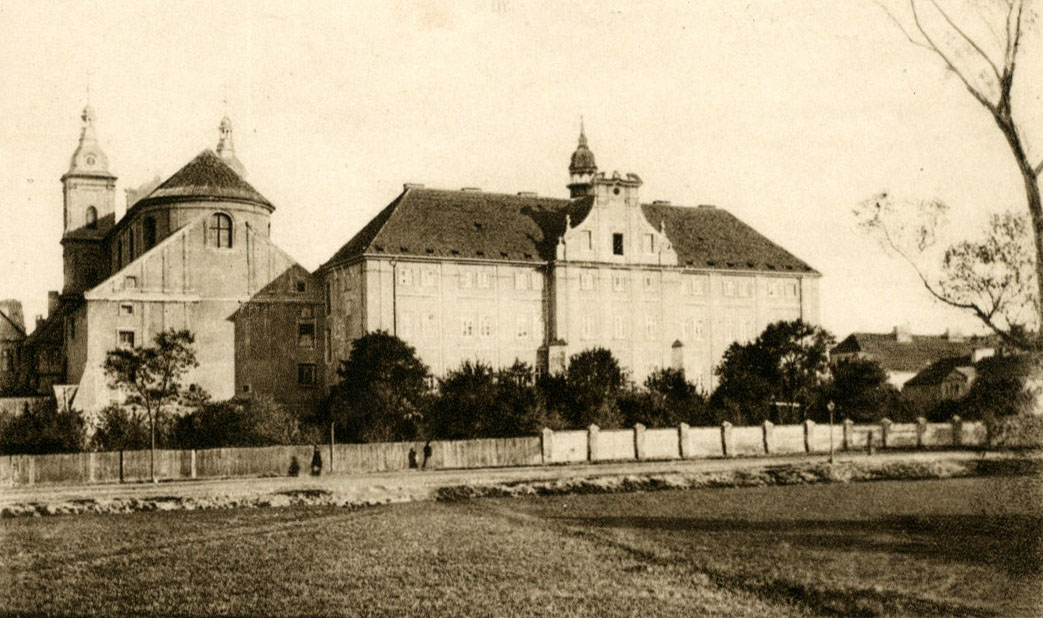 Piotrków Trybunalski - widok na kościół jezuitów oraz gimnazjum męskie (dawne kolegium jezuickie i pijarskie)